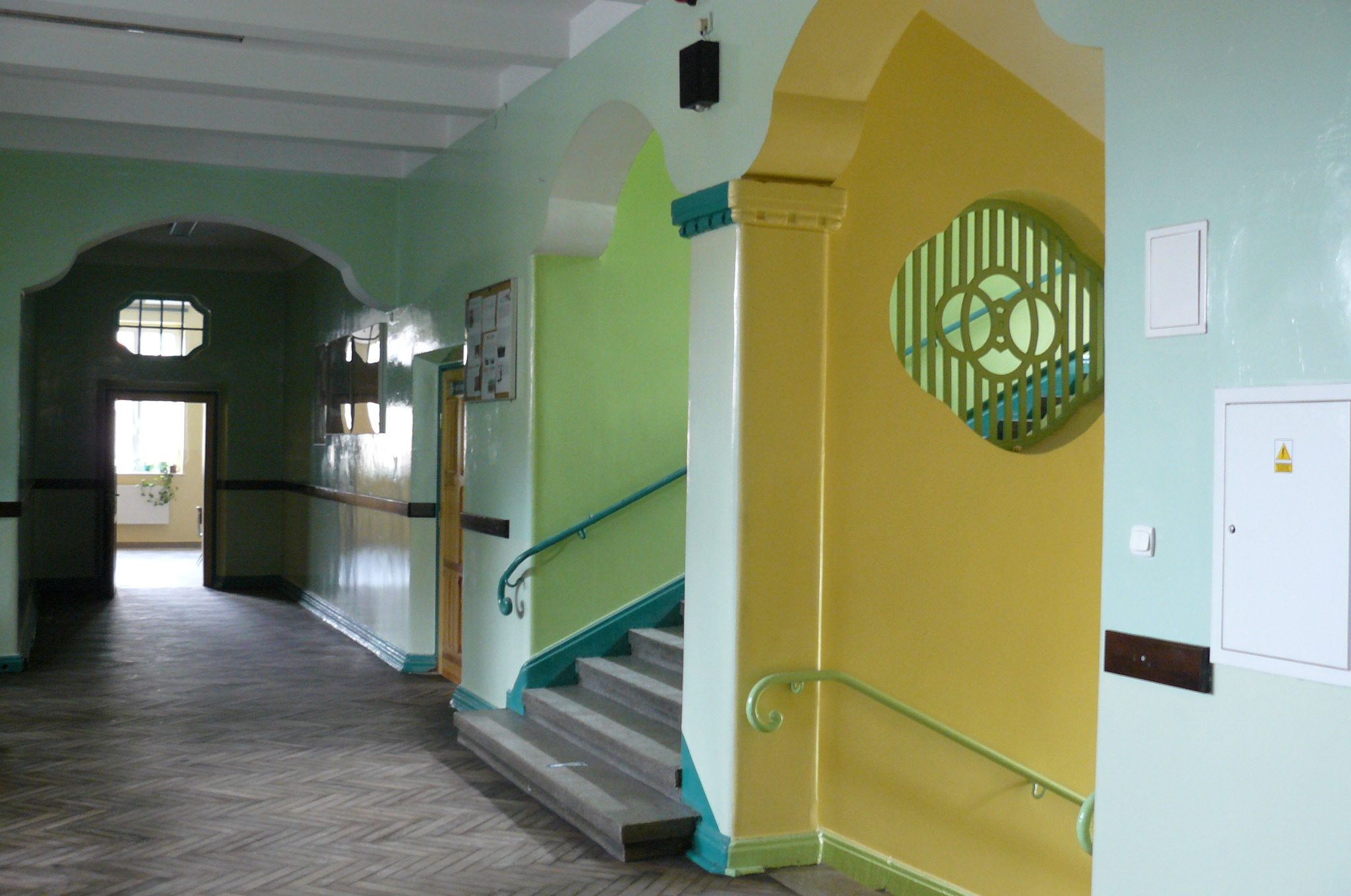 Poznań Łazarz - zespół zabudowań szkolnych (zabytek nr A 258).